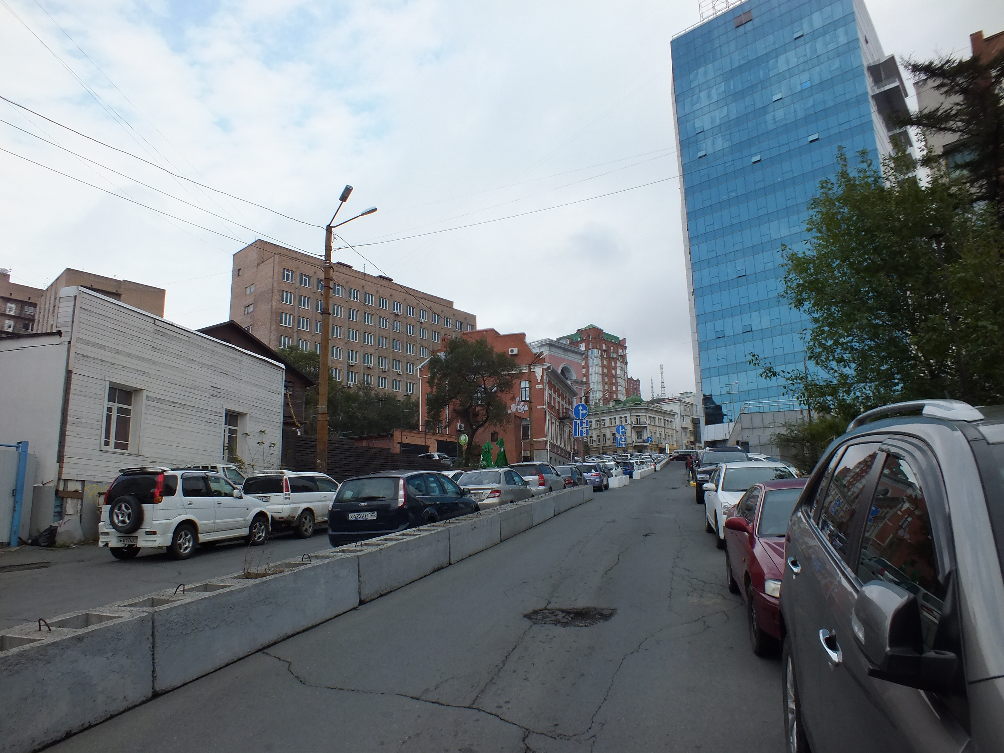 Владивосток ул Мордовцева ф1